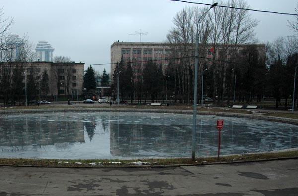 Пруд в парке на улице Дружбы в Москве. На заднем плане — посольство Китая.